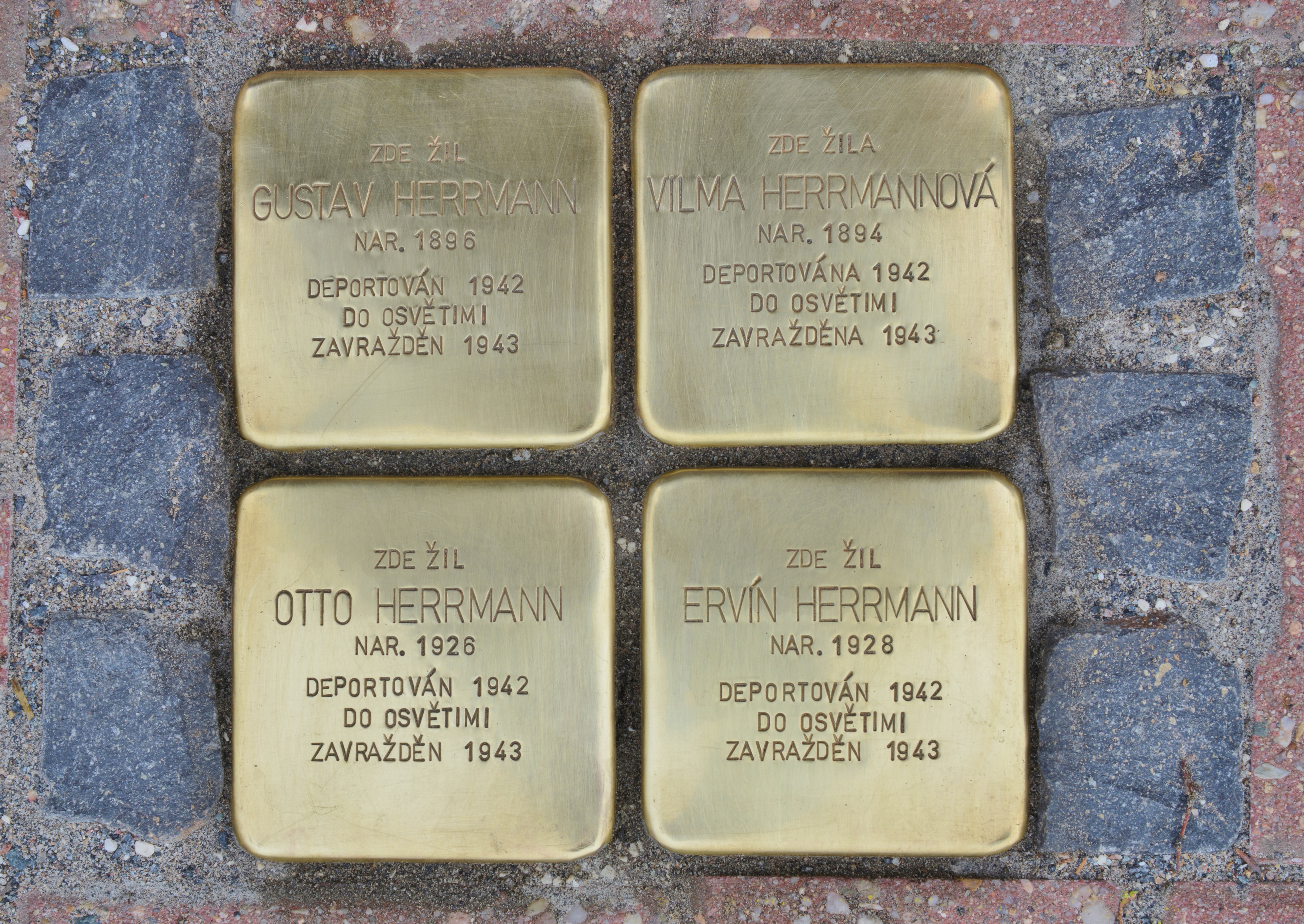 Slatiňany